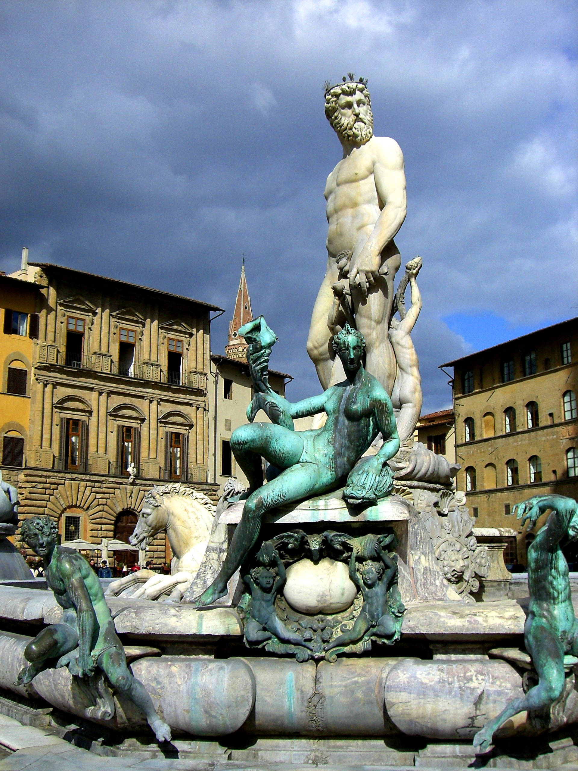 Statue of Neptune in Piazza della Signoria